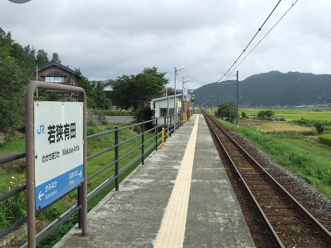 JR若狭有田駅ホーム。